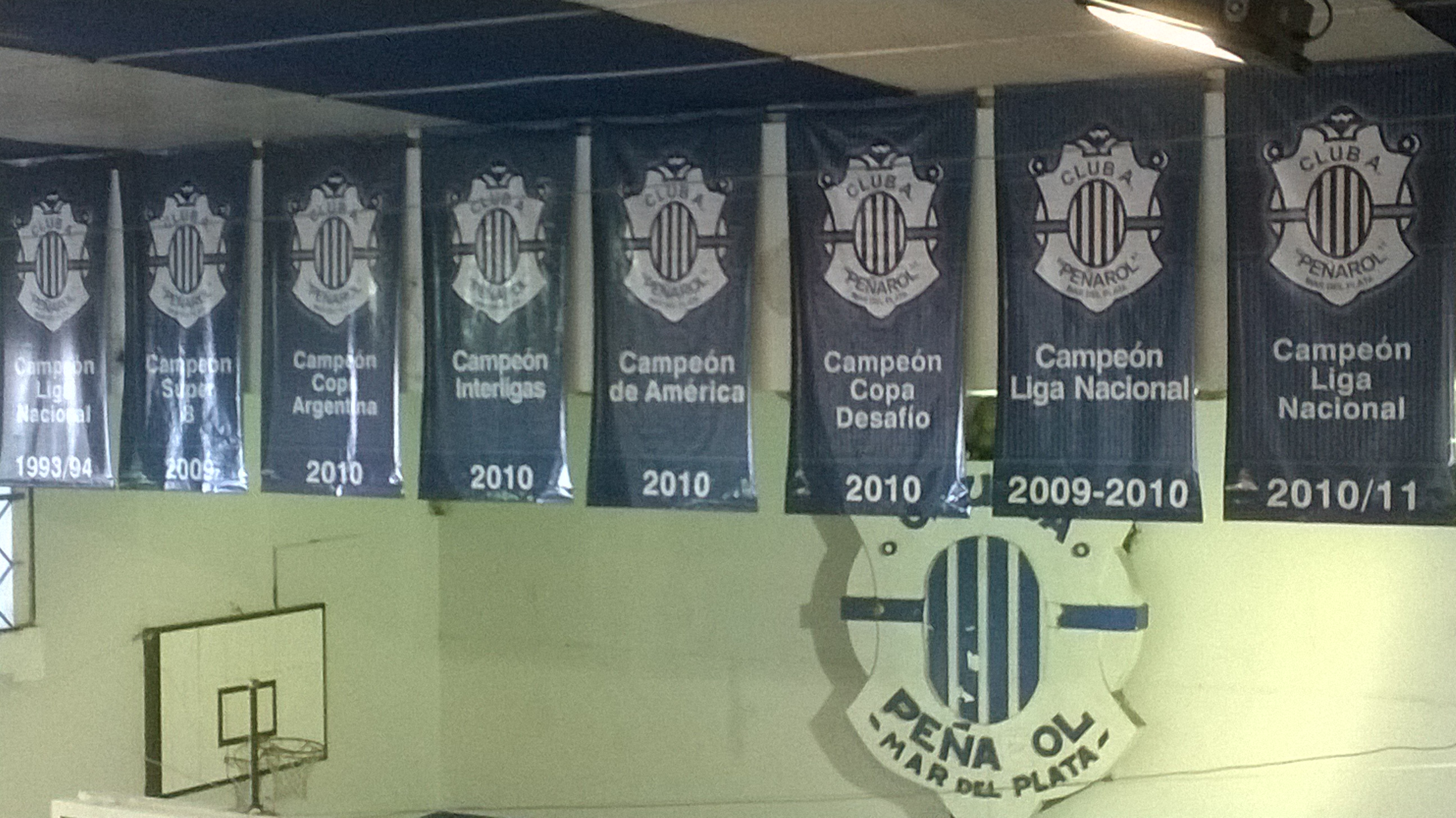 Banners con el palmarés del Club A Peñarol de Mar del Plata obtenido entre 1993 y 2011.